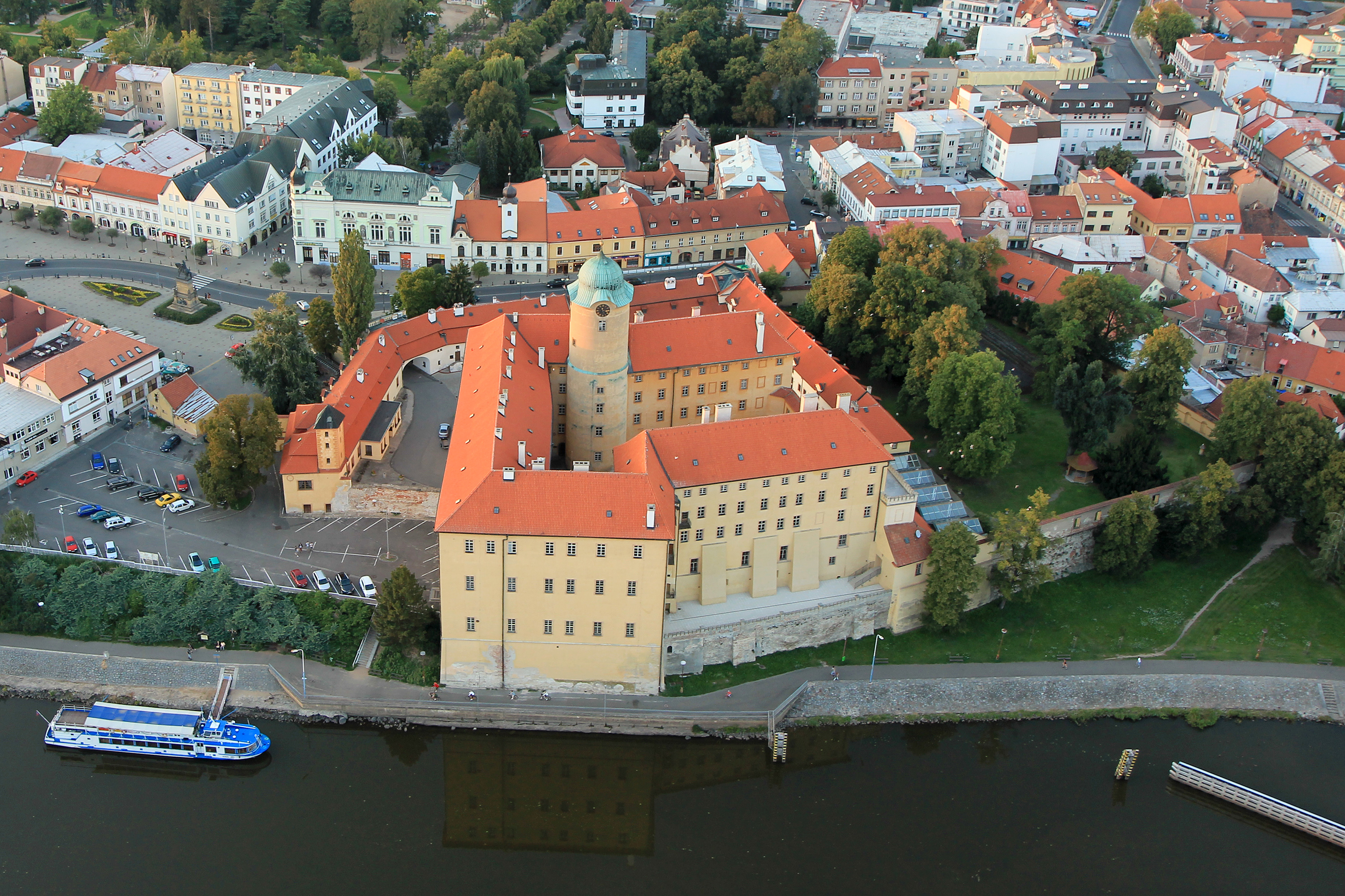 Zámek Poděbrady, Jiřího nám. 1, Poděbrady